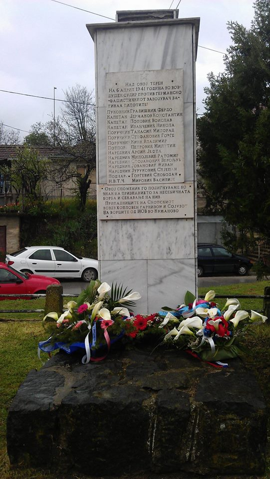 6 април - положување на цвеќе на загинатите авијатичари во Куманово